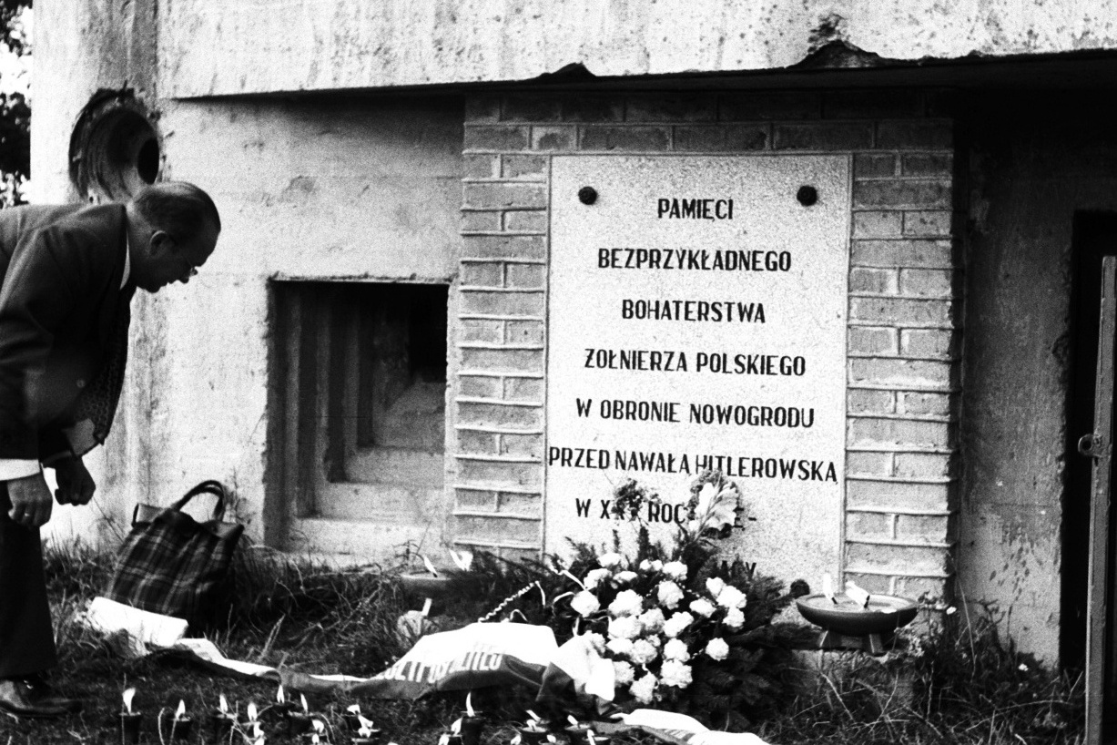 Tablica na schronie nad rzeką Narew upamiętniająca bohaterstwo obrońców Nowogrodu walczących z Niemcami we wrześniu 1939 r